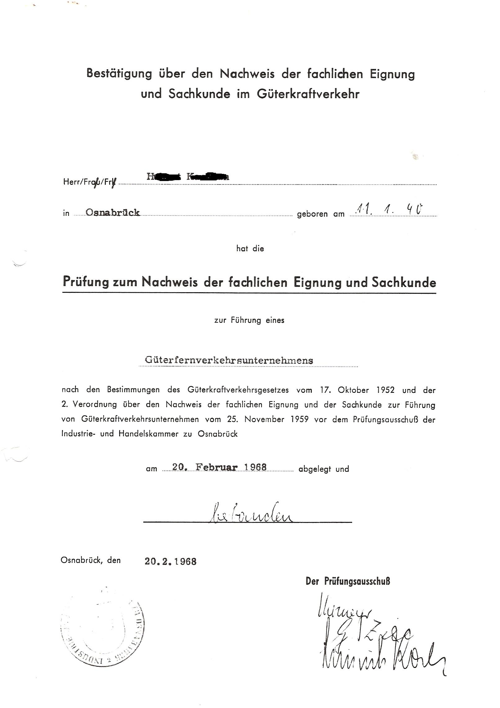 Fach + Sachkunde Bescheinigung für den Güterfernverkehr (1968).